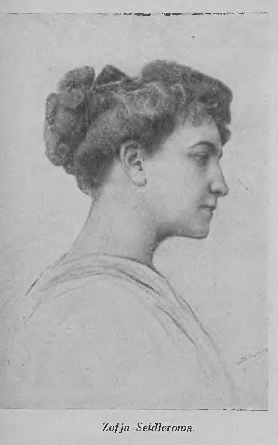 Zofia Seidler (1859-1919) - redaktorka czasopisma „Bluszcz” w latach 1906-1918, publicystka, tłumaczka. Portret opublikowany w jubileuszowym wydaniu „Bluszczu” w 1935 roku (nr 50/51).